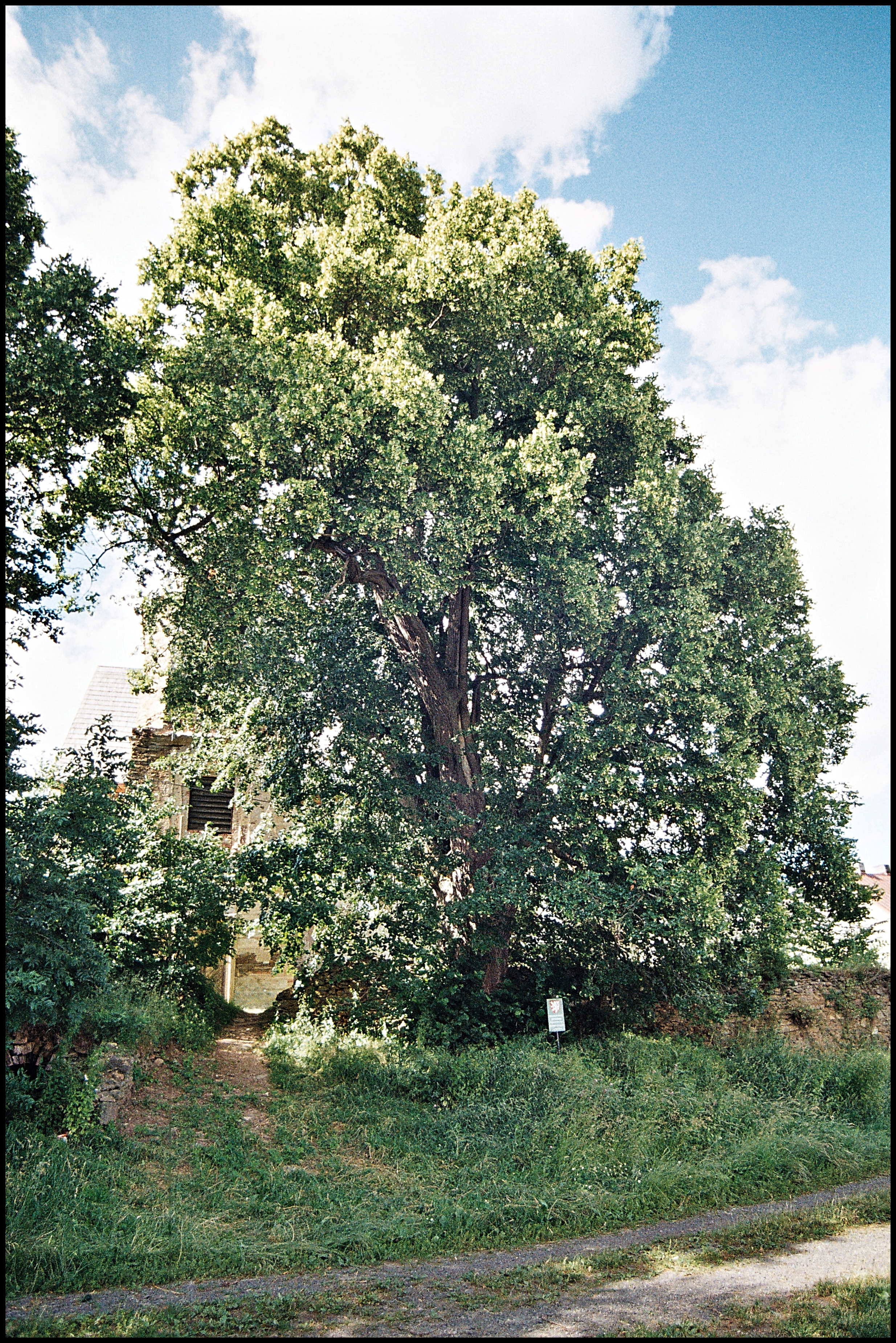 Lípa rostoucí u kostela v obci Kozlov.